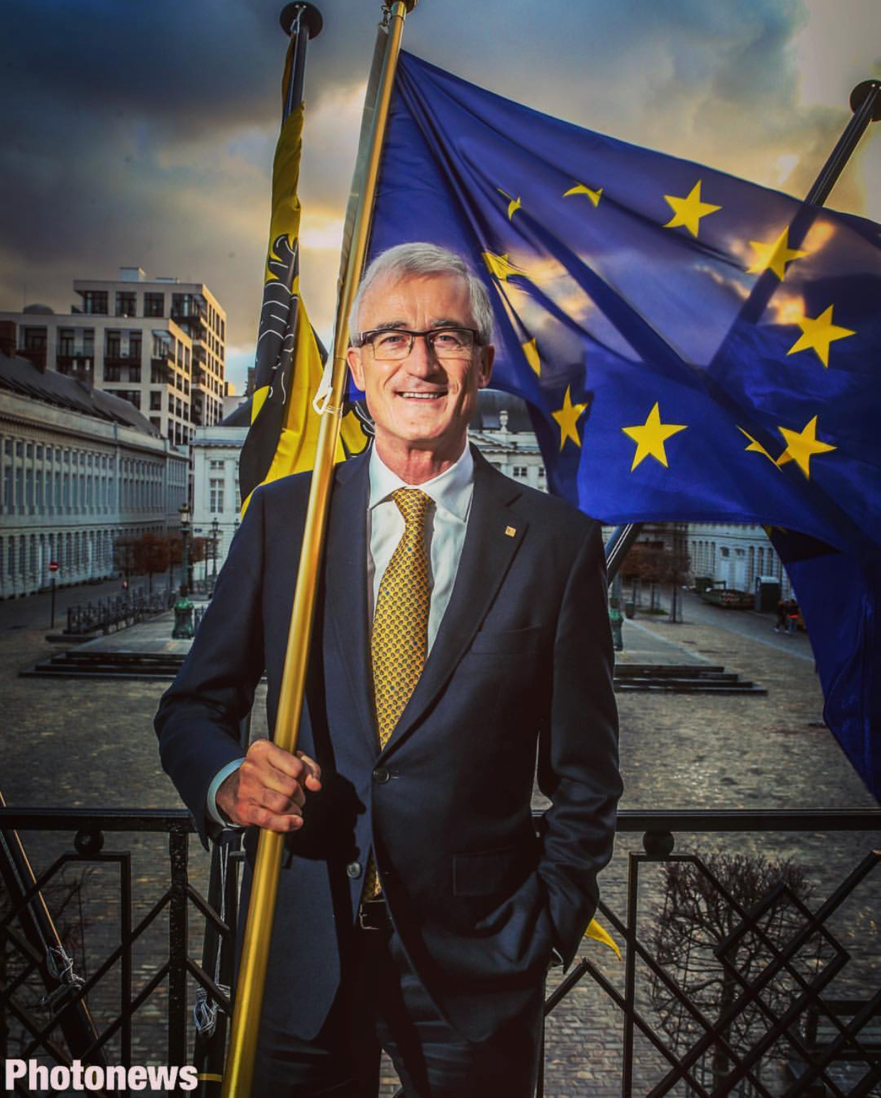 Geert Bourgeois - Martelarenplein Brussel